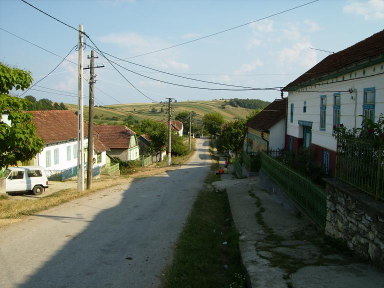 Gerník v Banátu